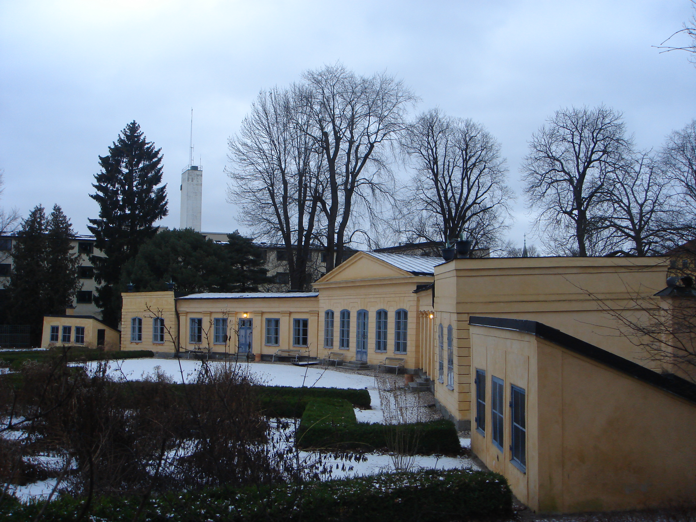 Linne garden uppsala